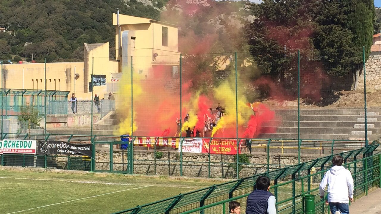 Calangianus 2-1 Castiadas, semifinale Play-Off Eccellenza Sardegna 2016-2017. La coreografia iniziale della GU15.